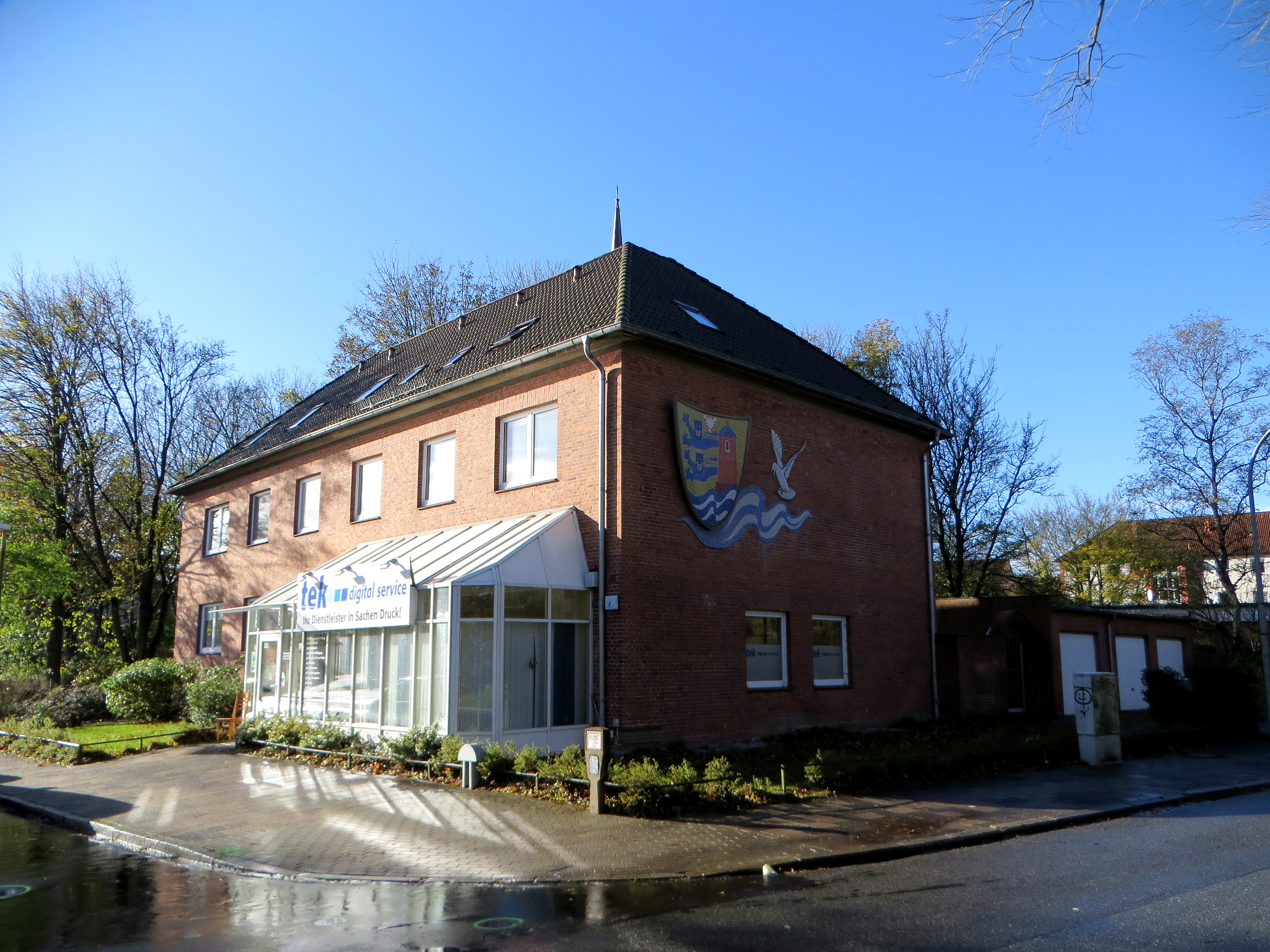 Flensburger Wappen, Flensburg-Südstadt, Rude, Diblerstr. 2, Bild 03